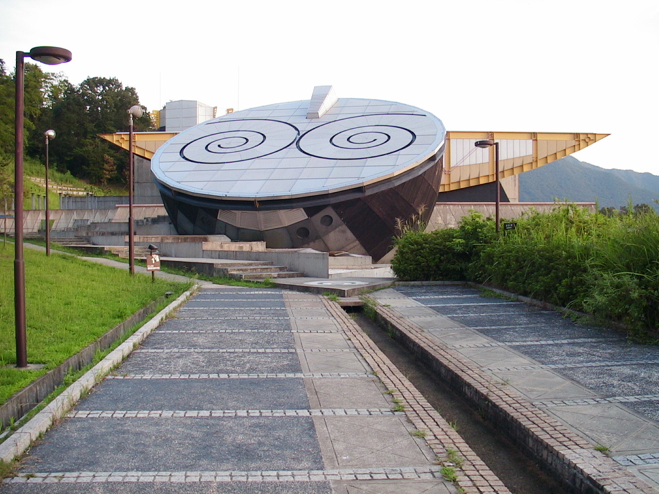 にしわき経緯度地球科学館（にしわきけいいどちきゅうかがくかん）は、兵庫県西脇市の東経135度、北緯35度の交点にある「地球・宇宙」をテーマにした科学館。愛称「テラ・ドーム」。 ～photo by Autumn Snake 【おぉたむすねィく探検隊】